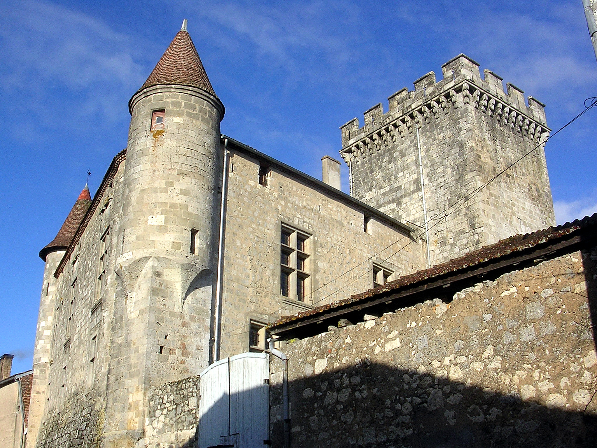 Château de Xaintrailles (Lot-et-Garonne, France)